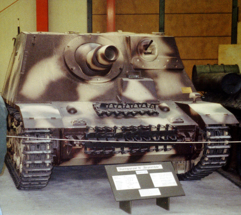 Beschreibung: Sturmpanzer IV Brummbär